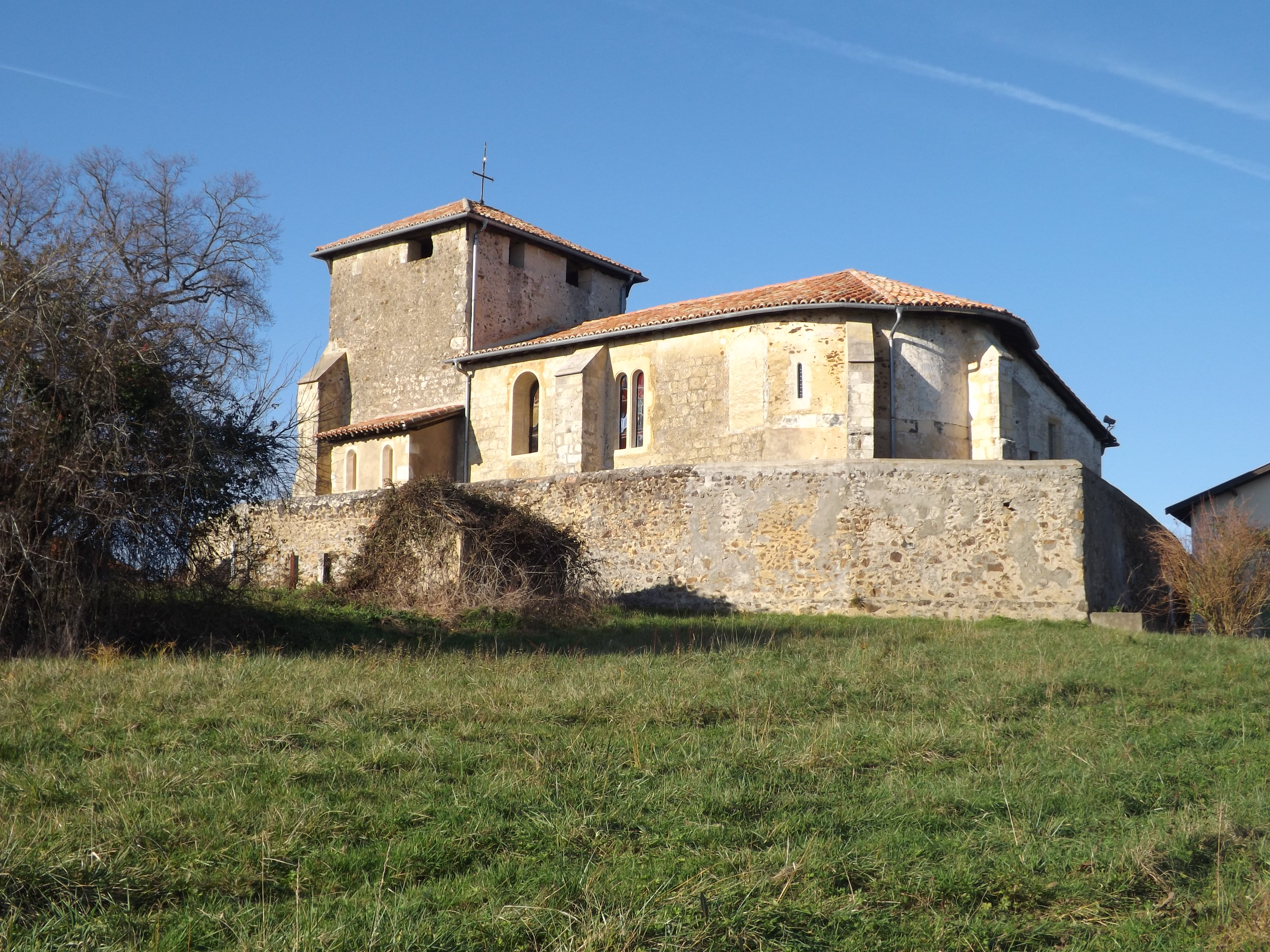 Glèisa de Sent Andriu ; Vergëi ; Shalòssa ; Gasconha